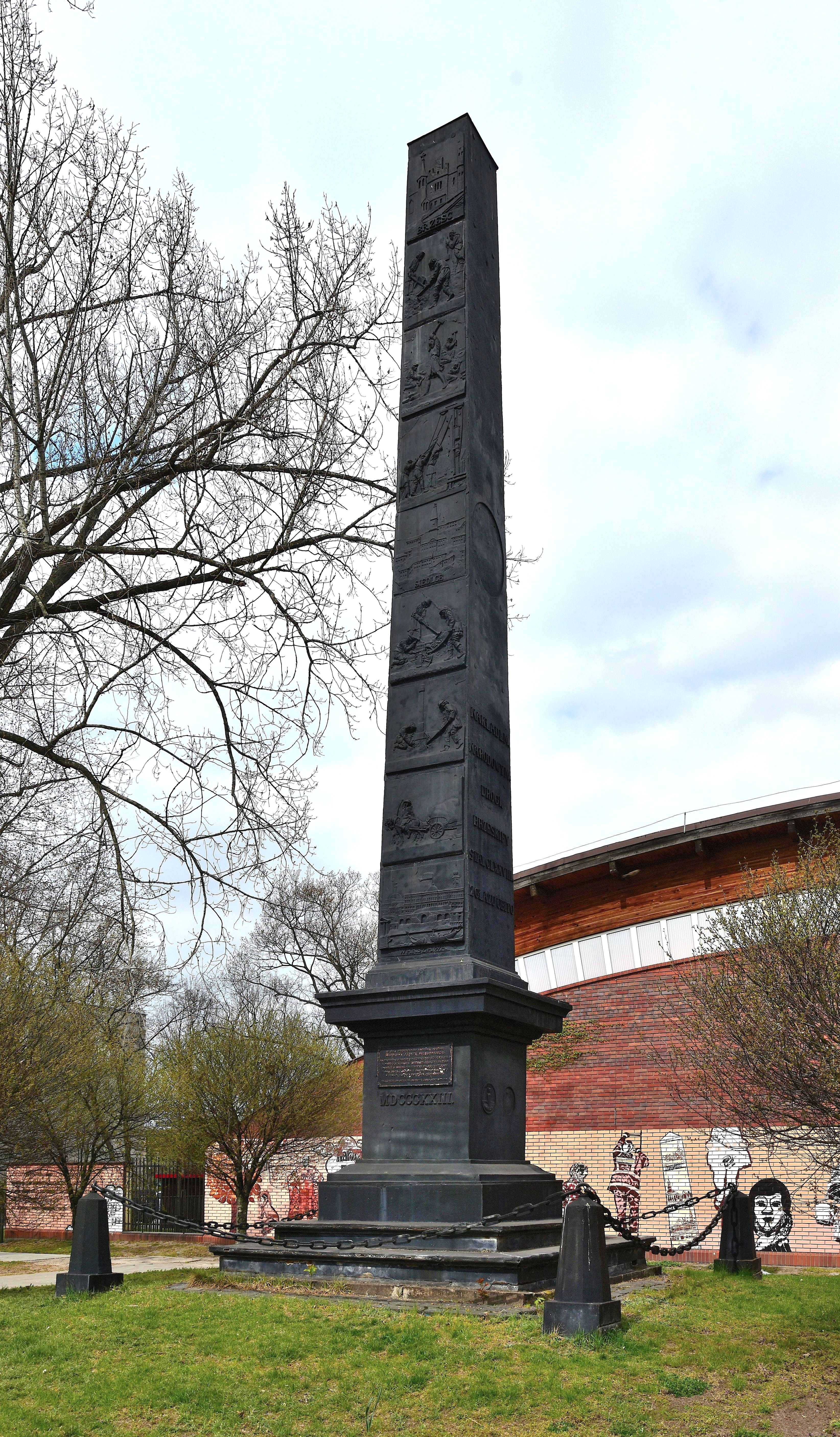 Pomnik Budowy Szosy Brzeskiej przy ul. Grochowskiej w Warszawie